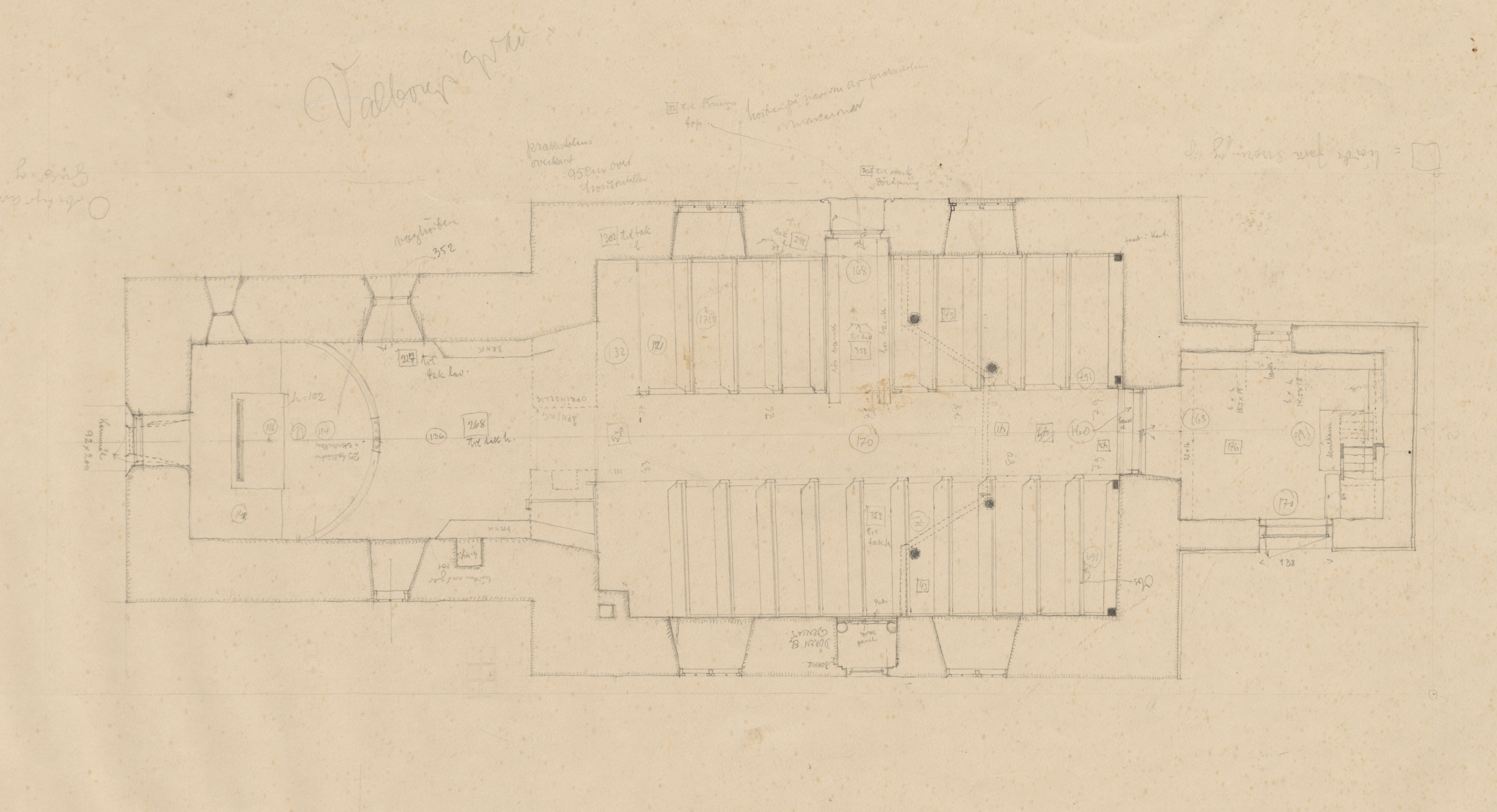 Bildet er hentet fra Riksantikvaren. Grunnplan Eier : Riksantikvaren Sted : Norway, Møre og Romsdal, Giske Medium